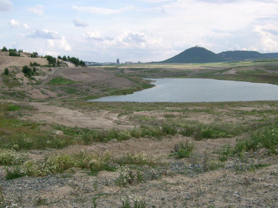 Pohled na vznikající Jezero Most od bývalých Pařidel v Mostecké pánvi